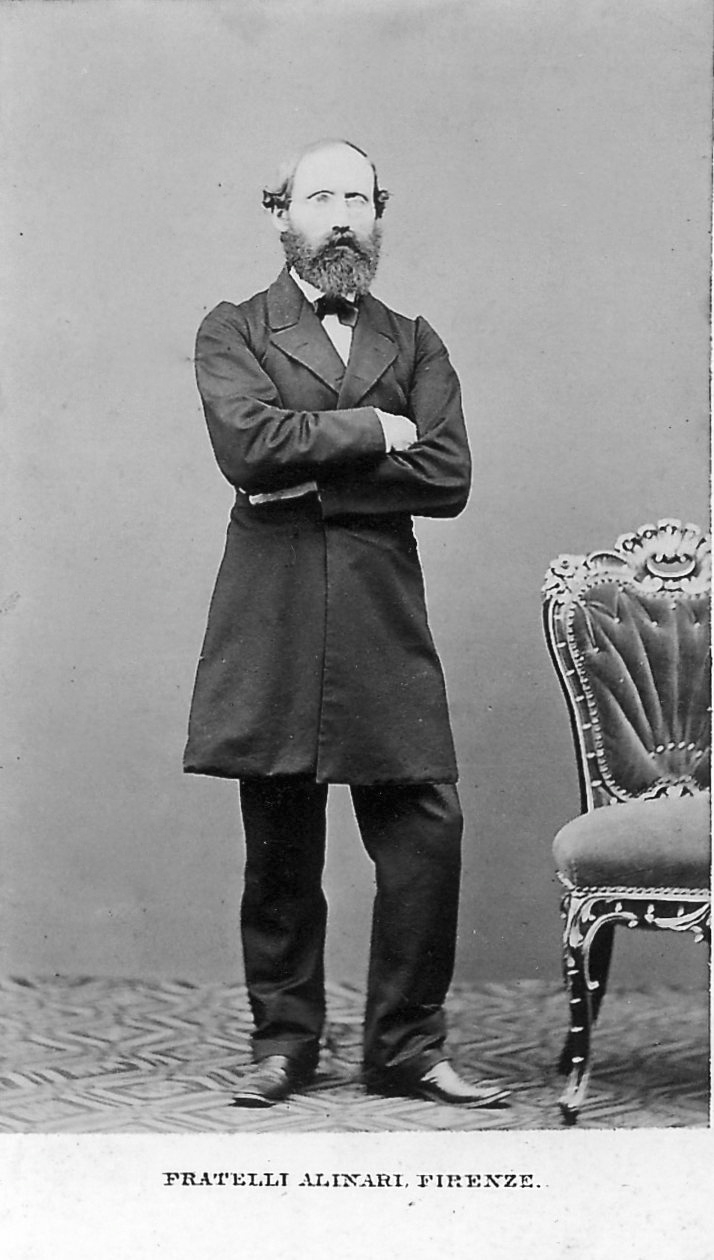 Bernhard Riemann (1826–1866), deutscher Mathematiker